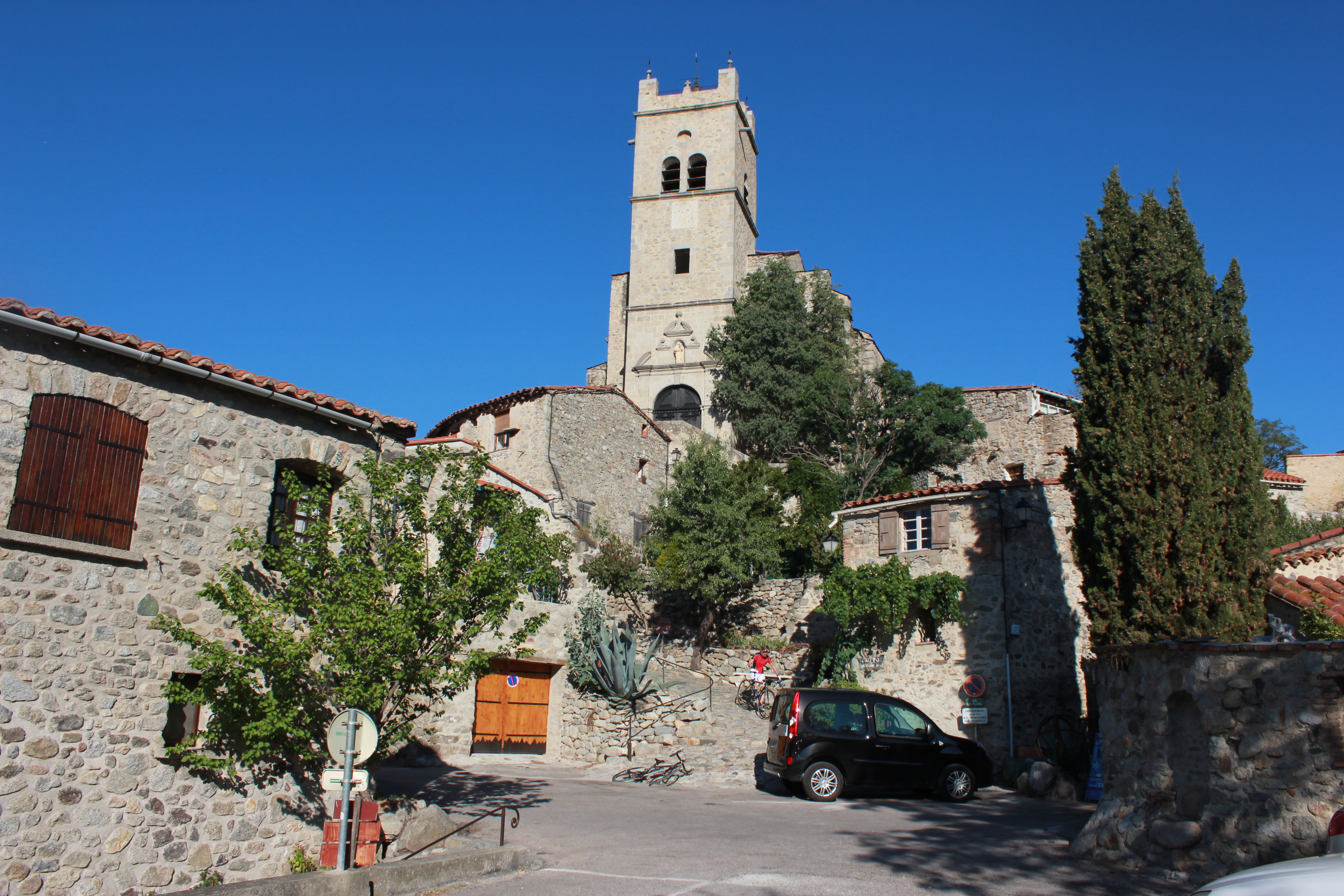 Eus, Pyrénées-Orientales,un des plus beaux villages de France